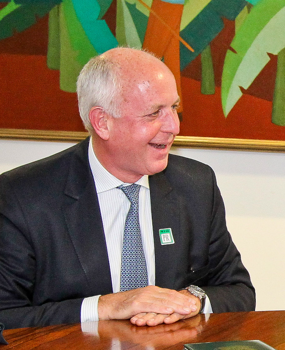 Presidenta Dilma Rousseff durante encontro com Thierry Peugeot, Presidente do conselho de Administração do grupo PSA Peugeot Citroen, no Palácio do Planalto. (Brasília - DF, 26/10/2011)